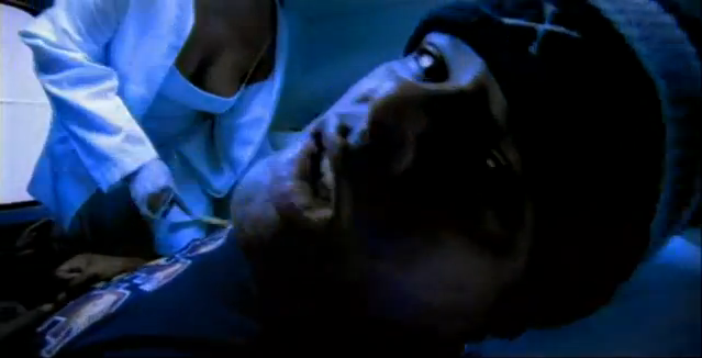 Cena do Clipe Câmbio Negro - Esse é Meu País